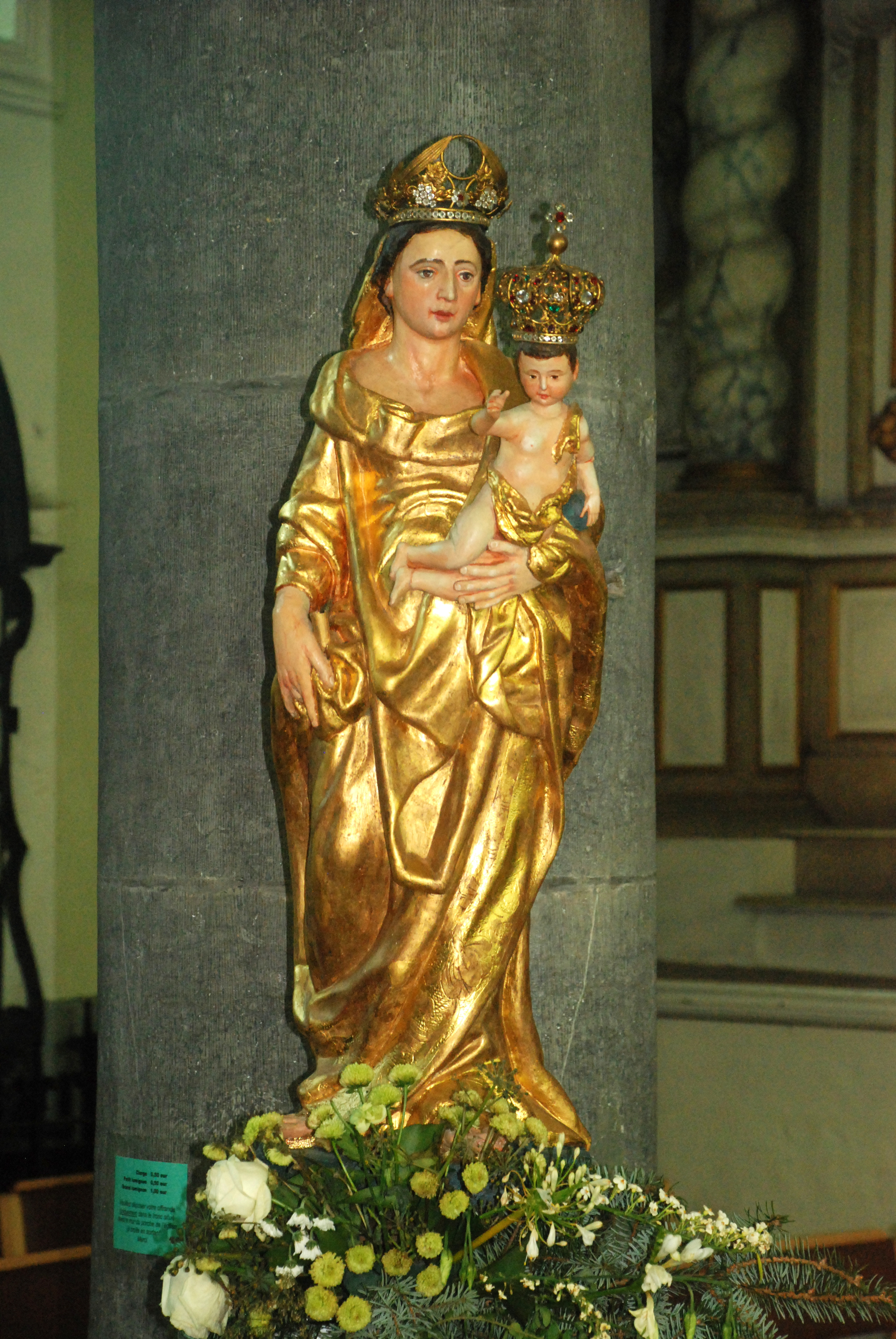 Belgique - Brabant wallon - Église de Court-Saint-Étienne